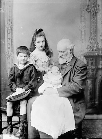 Sir Sanford Fleming en compagnie de ses petits-enfants, en juillet 1893.